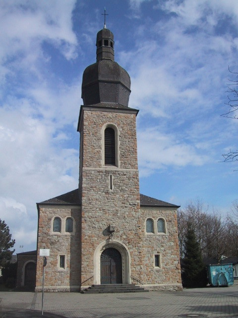 Die St.-Nikolaus-Kirche in Bochum.